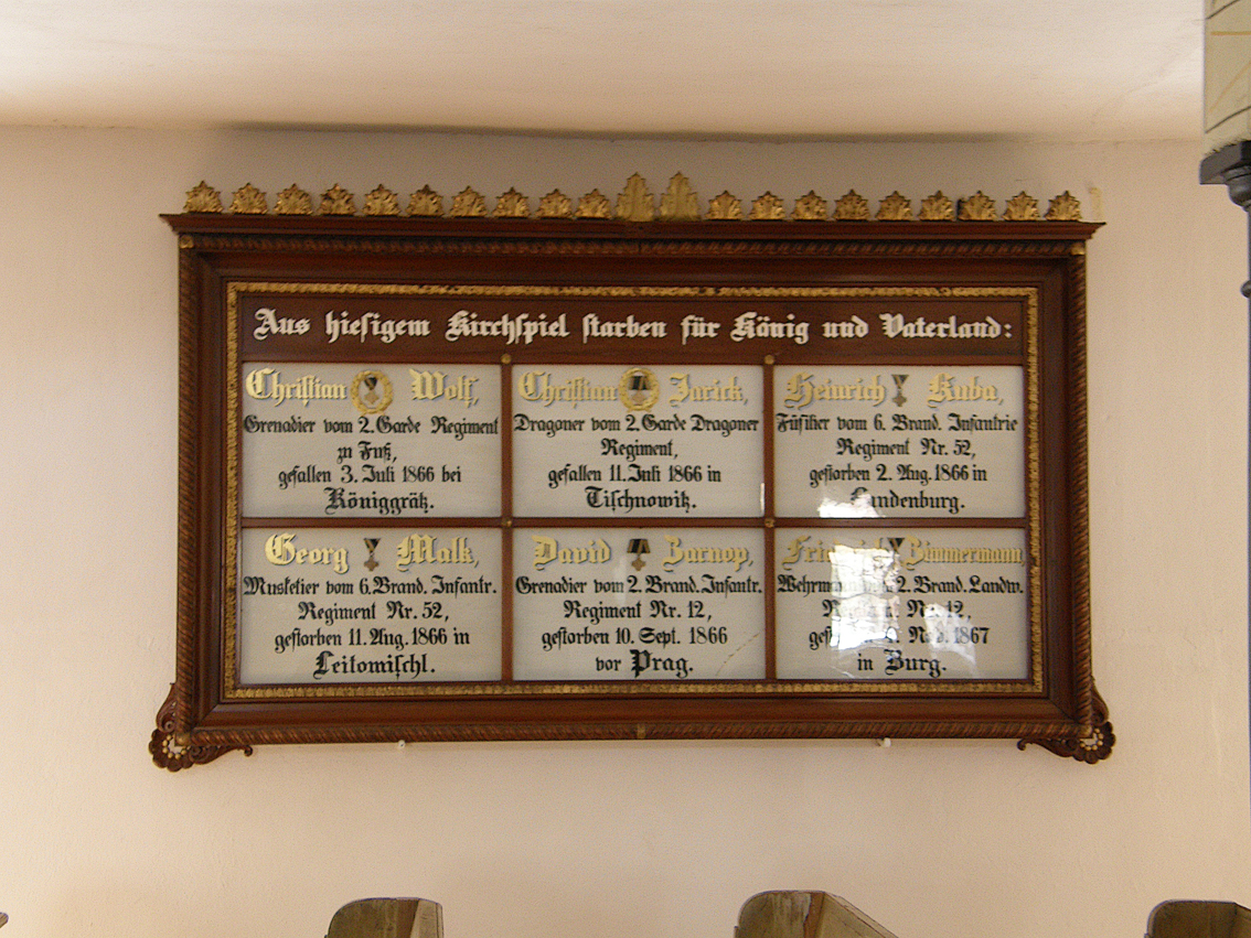 Gedenktafel für die Gefallenen 1866 in der Kirche in Burg (Spreewald)